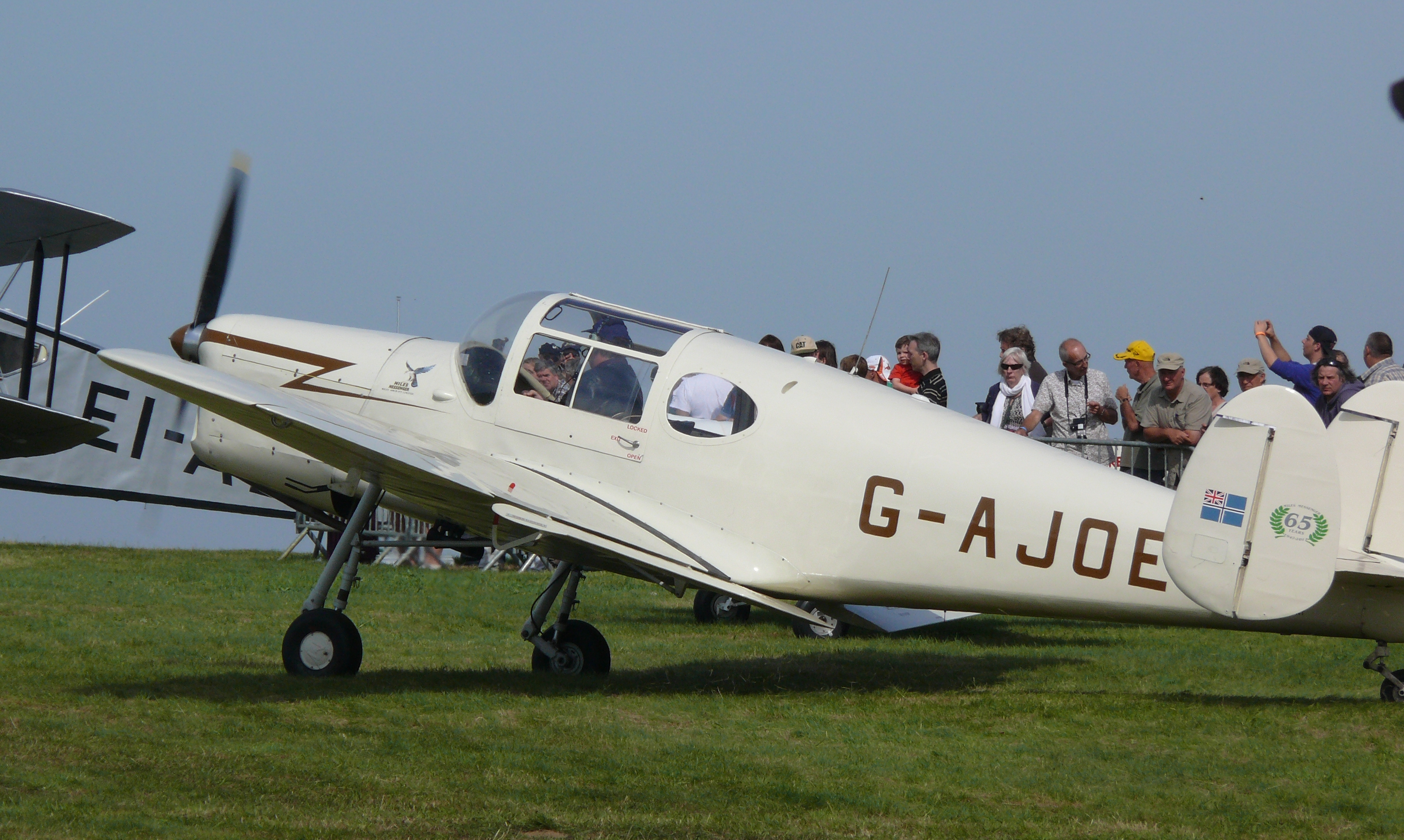 Miles M-38 Messenger 2A G-AJOE (cn 6367), built in 1947, op de Schaffen Fly and Drive In 2012.